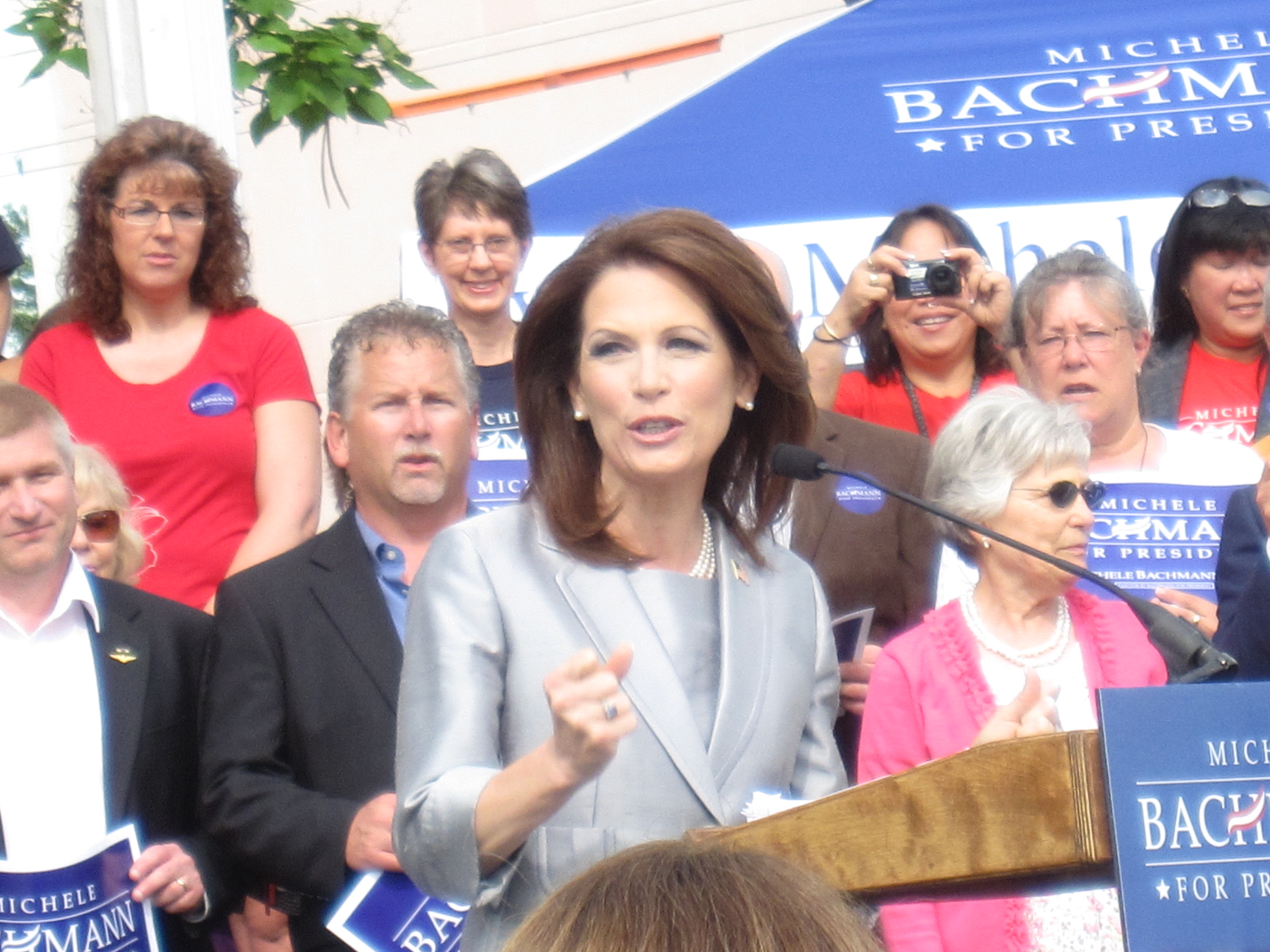 Bachmann Announcement in Waterloo 005